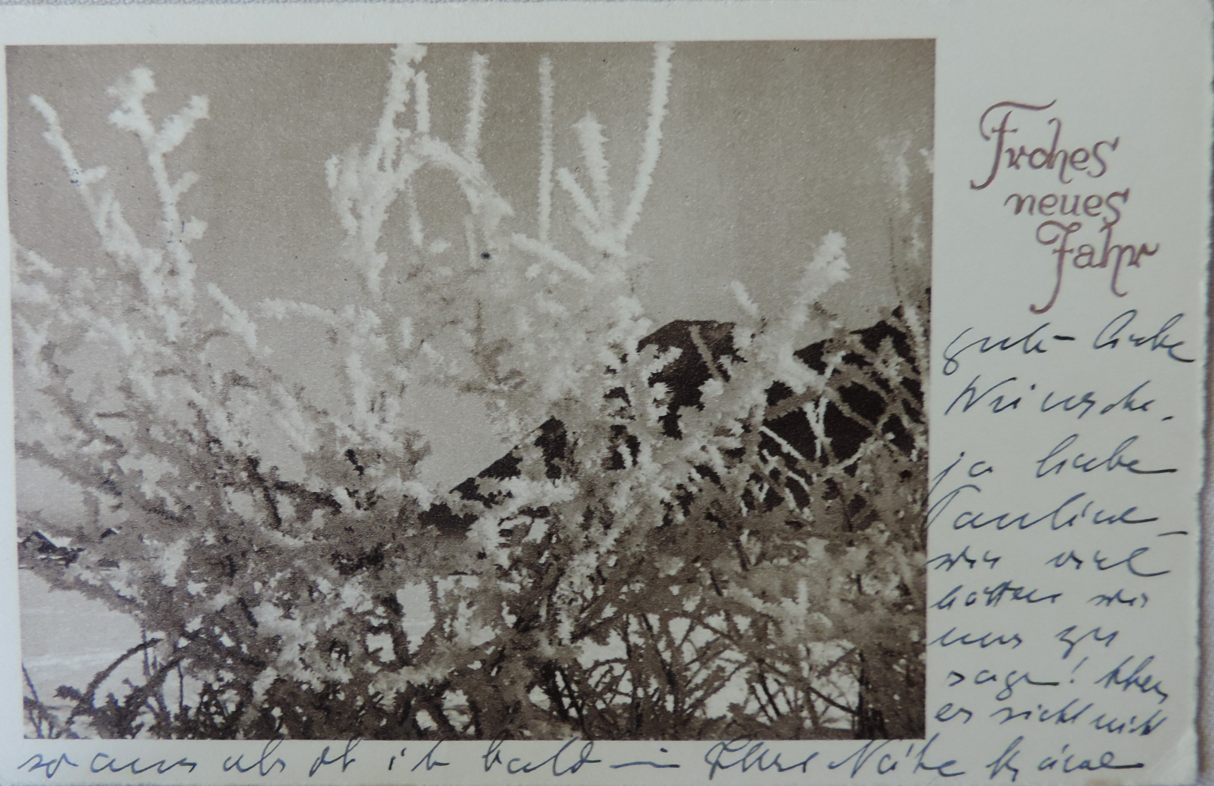 Postkarte mit Neujahrsgüßen aus dem Jahre 1933